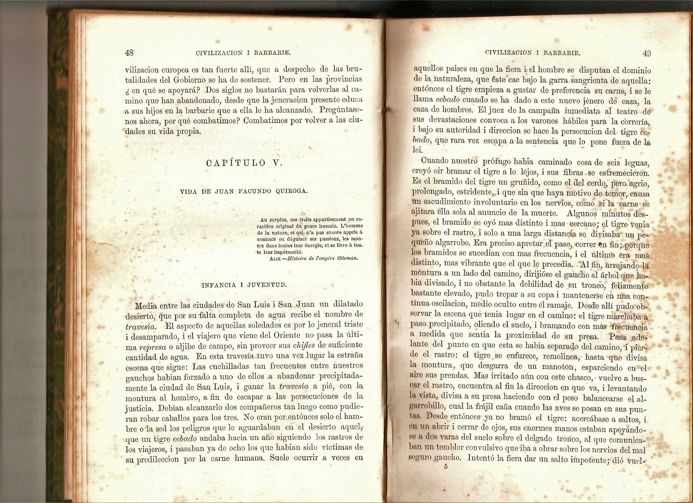 Pág 48 y 49 del Libro "Facundo: Civilización y Barbarie" de Domingo Faustino Sarmiento (cuarta edición en castellano, París, Librería Hacette y Cia. 79, Boulevard Saint Germain. 1874.)